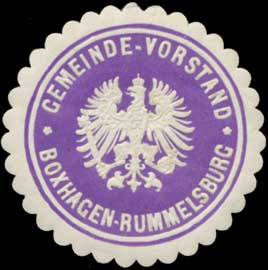 Sealing stamp Title: Gemeinde-Vorstand Boxhagen-Rummelsburg Description: violett, weiß, geprägt Place: Boxhagen-Rummelsburg size: 4 cm